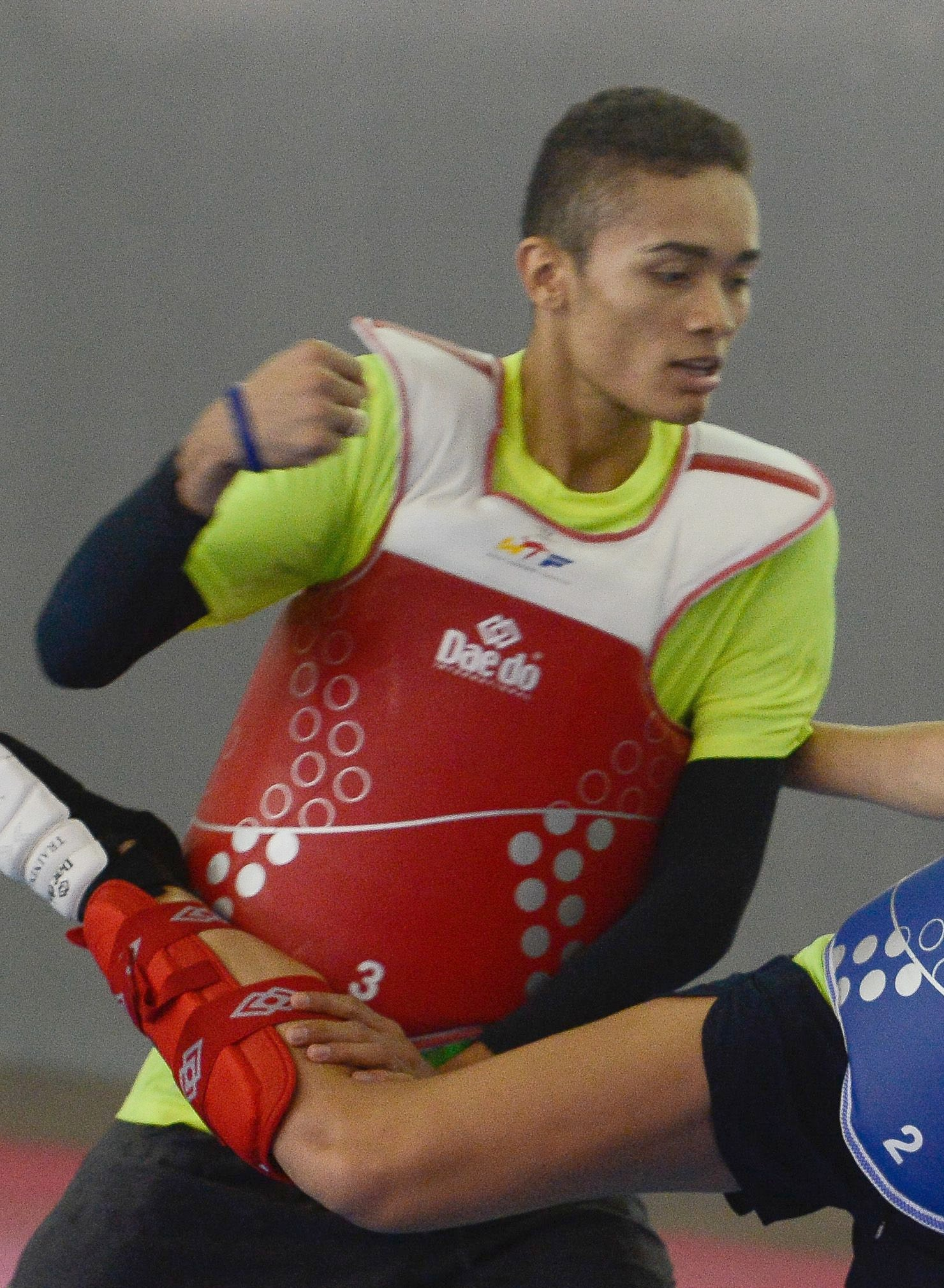 Rio de Janeiro - Atletas de taekwondo treinam para as Olimpíadas Rio 2016 na casa do Time Brasil na Urca (Tomaz Silva/Agência Brasil)